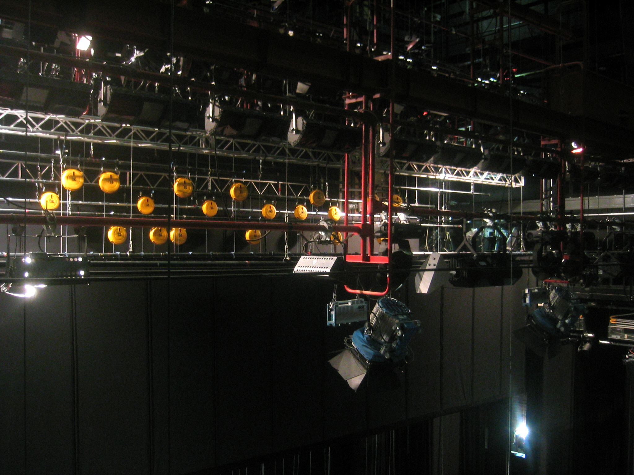 Mannheim, Nationaltheater: Oberbühne, Detail